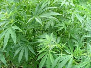 Cannabis sativa, Конопля полезная